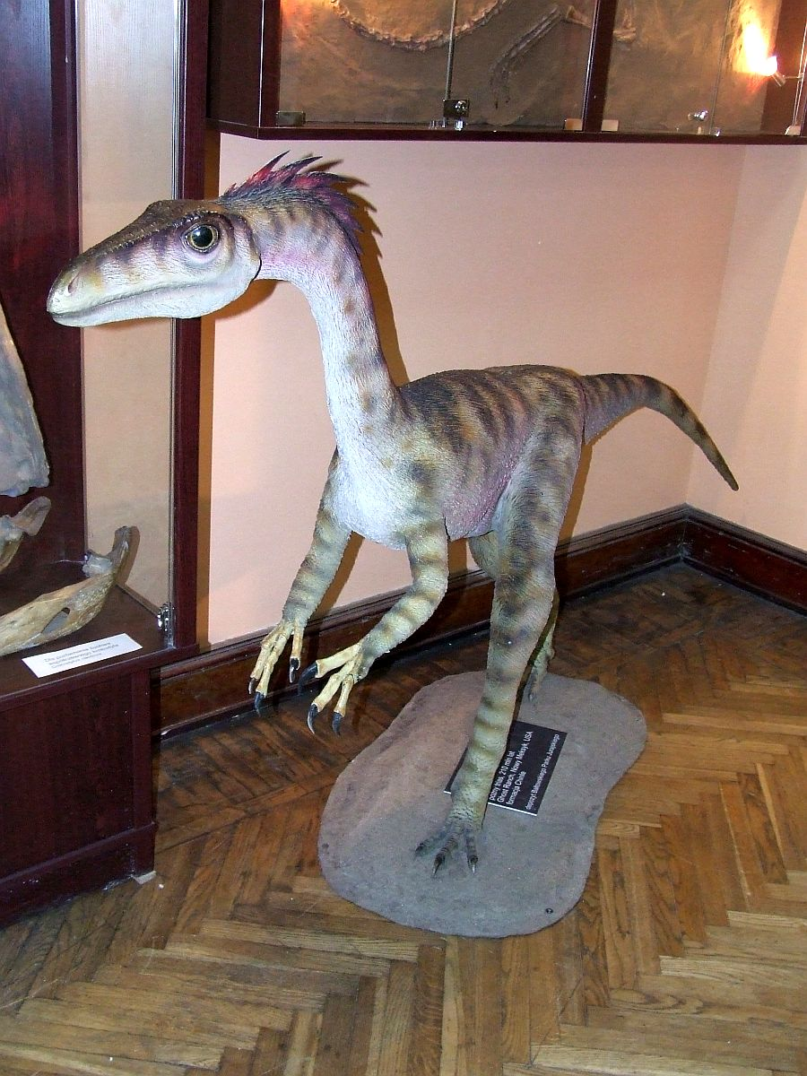 Coelophysis bauri, Muzeum Ewolucji PAN